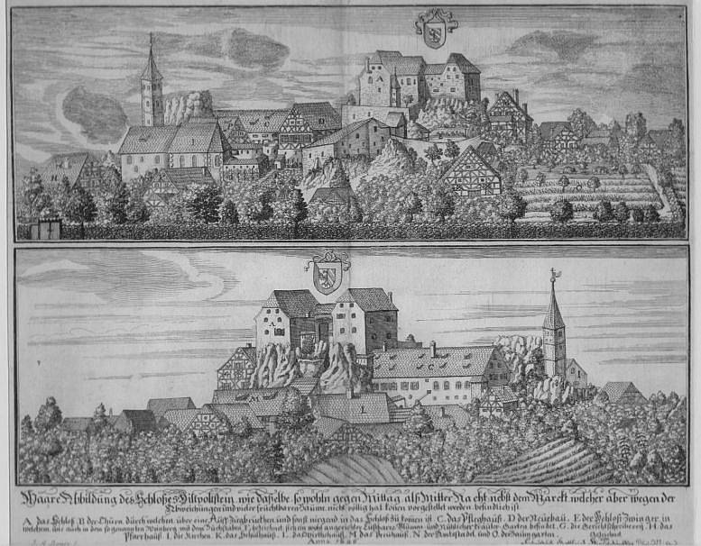 Kupferstich, Johann Alexander Böner, 1696